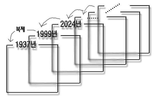 영화 13층에서 일어나는 시뮬라시옹 현상